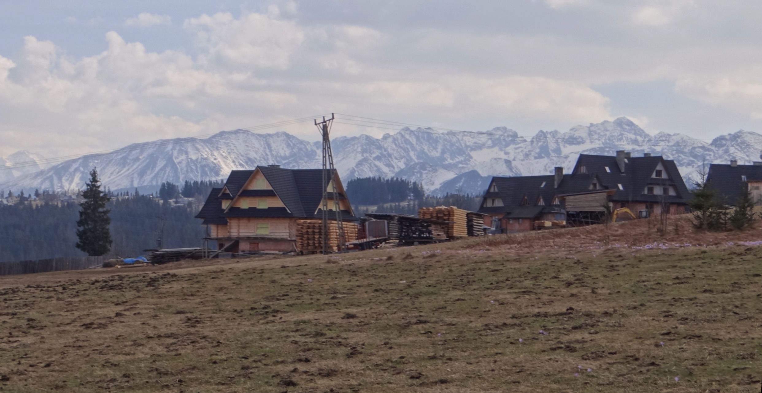 Dzianisz i widok na Tatry